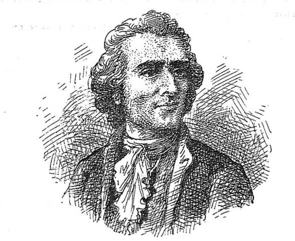 Gravat del compositor Domènech Tarradellas (Barcelona, 13 de febrer del 1713 - Roma, 20 de maig del 1751), apareguda a la revista Avens el gener de 1884.